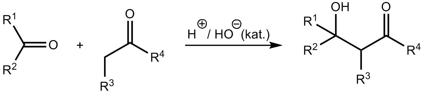 Aldoladdition zweier Ketone